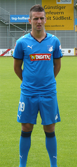 Fototermin Saison 08/09